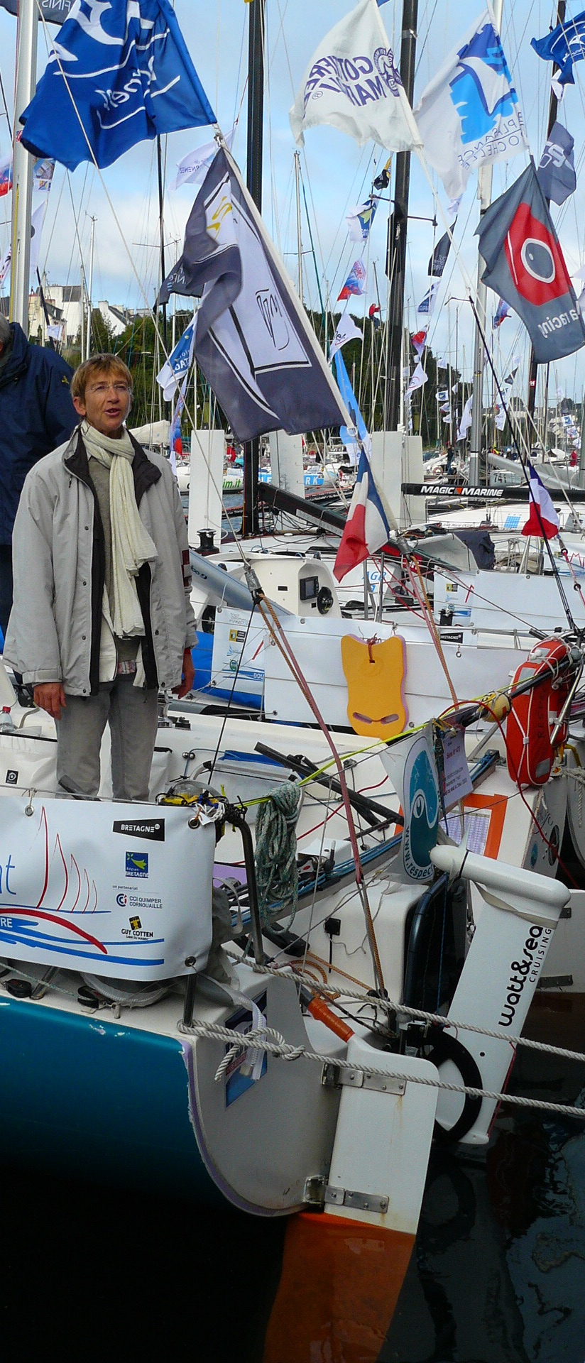 Rafaëla le Gouvello, véliplanchiste, à Douarnenez le 12 octobre 2013, quelques jours avant le départ de sa première course en bateau, la Mini Transat 6.50, sur RespectOcean.